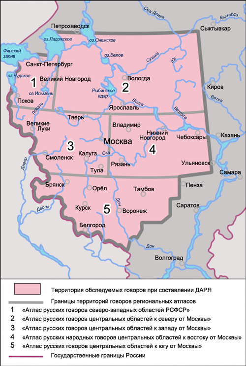 Территория обследуемых говоров при составлении диалектологического атласа русского языка. На основе данных: «Диалектологический атлас русского языка. Центр Европейской части СССР». Выпуск I: Фонетика / Под ред. Р. И. Аванесова и С. В. Бромлей. М.: Наука, 1986. — С. 11. Язык русской деревни. Источники Школьного диалектологического атласа. Схема 1